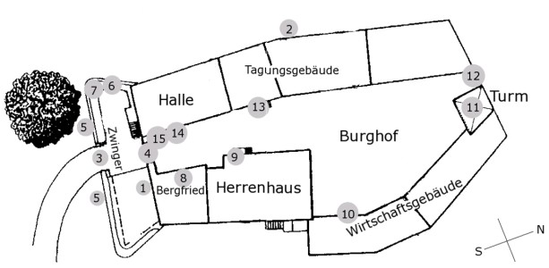 Grundriss und in der Beschreibung erwähnte Stellen von Burg Fürsteneck.